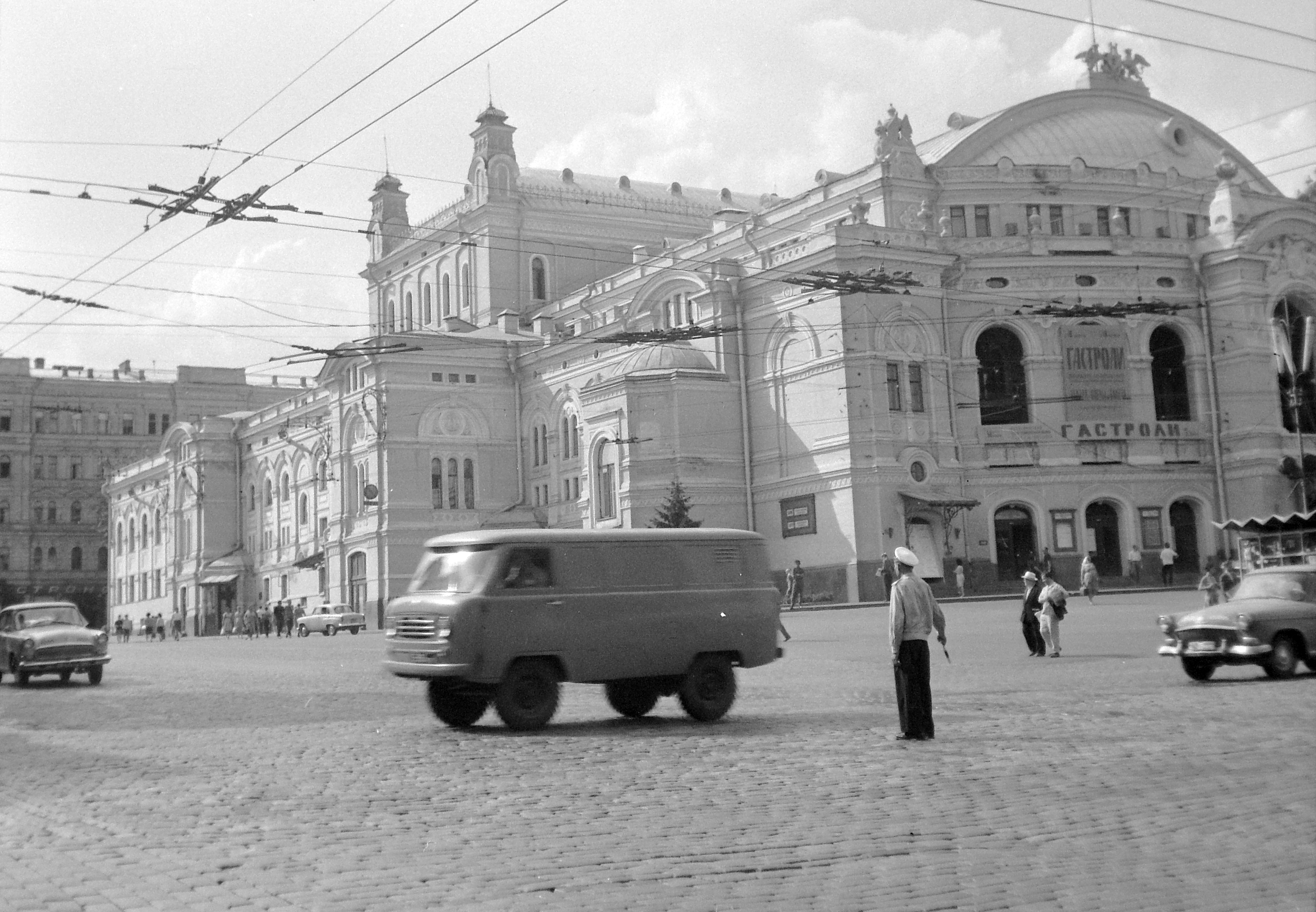 Tarasz Sevcsenko Nemzeti Opera és Balett Szinház. Location: Ukraine, Kiev Tags: cop, automobile, cobblestones, poster, Soviet Union Title: Tarasz Sevcsenko Nemzeti Opera és Balett Szinház.